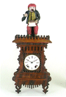 Eine Figurenuhr. Neben den Kuckucksuhren entstanden im Schwarzwald bald auch andere einfache Automaten, in der Fachsprache "Figurenuhren", in der Mundart "Männleuhren" genannt. Da rollten die Augen der aufgemalten Figuren im Sekundentakt oder es wurden Glocken geläutet, auch Soldaten konnten aufmarschieren. "Heimkinos" jener Zeit.